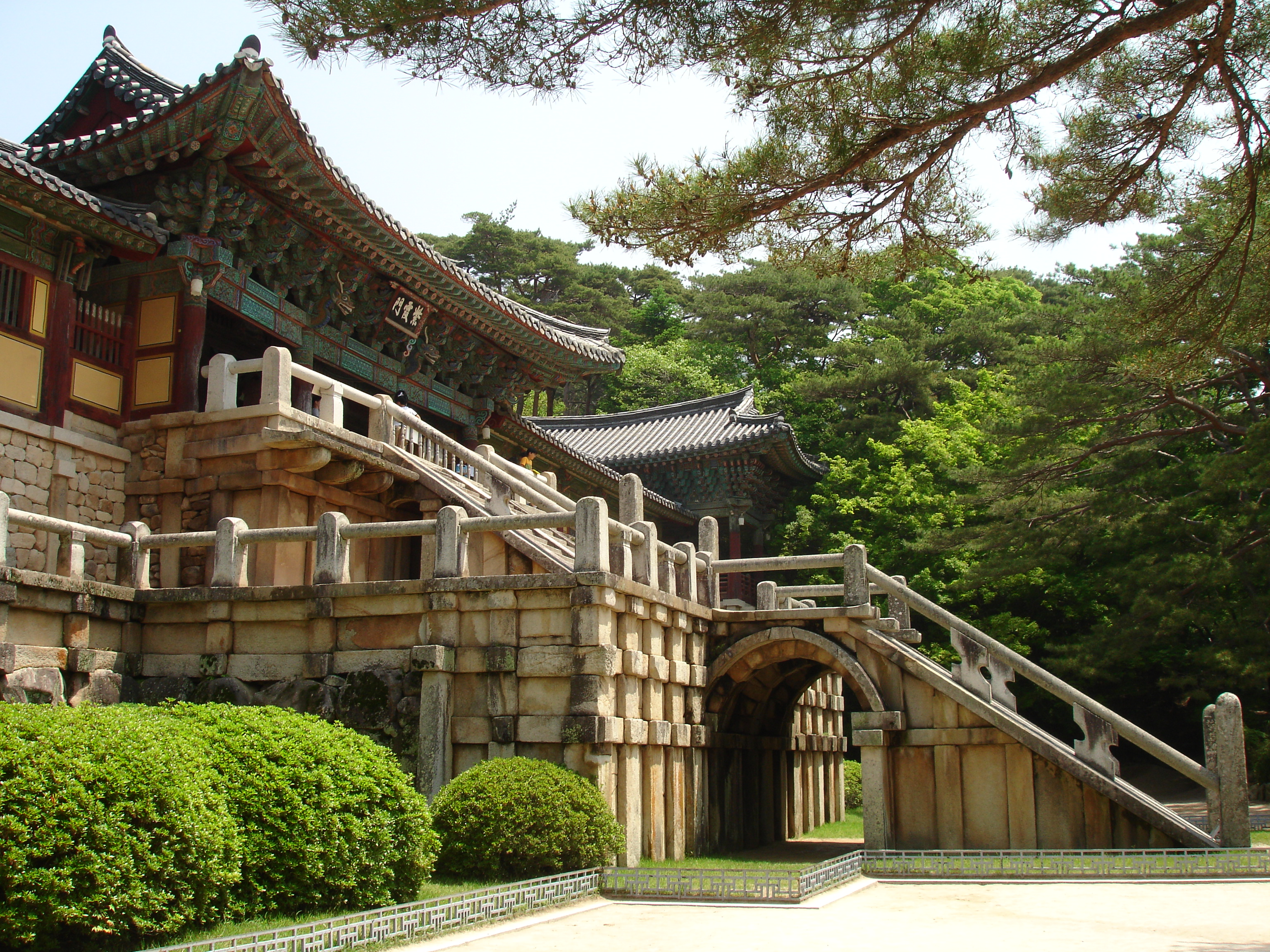 경주 불국사 #WLM2016, #WLMKorea